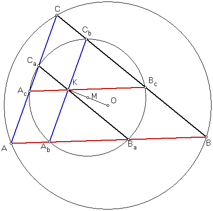 Description De eerste cirkel van Lemoine Date16 January 2007SourceOwn workAuthorFvlamoen De eerste cirkel van Lemoine